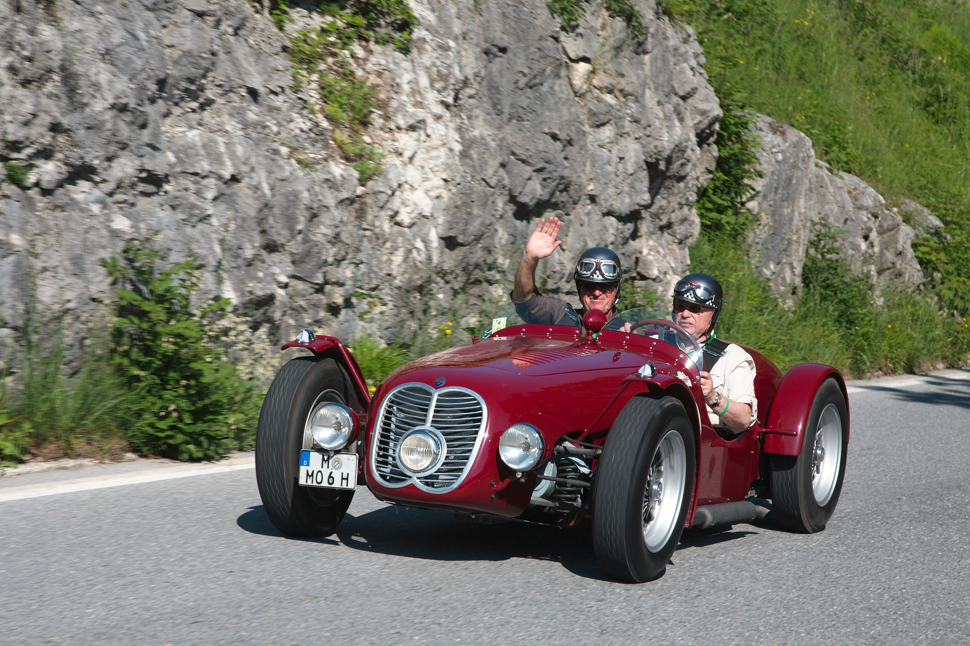 Maserati A6GCM at Gaisbergrennen 2009